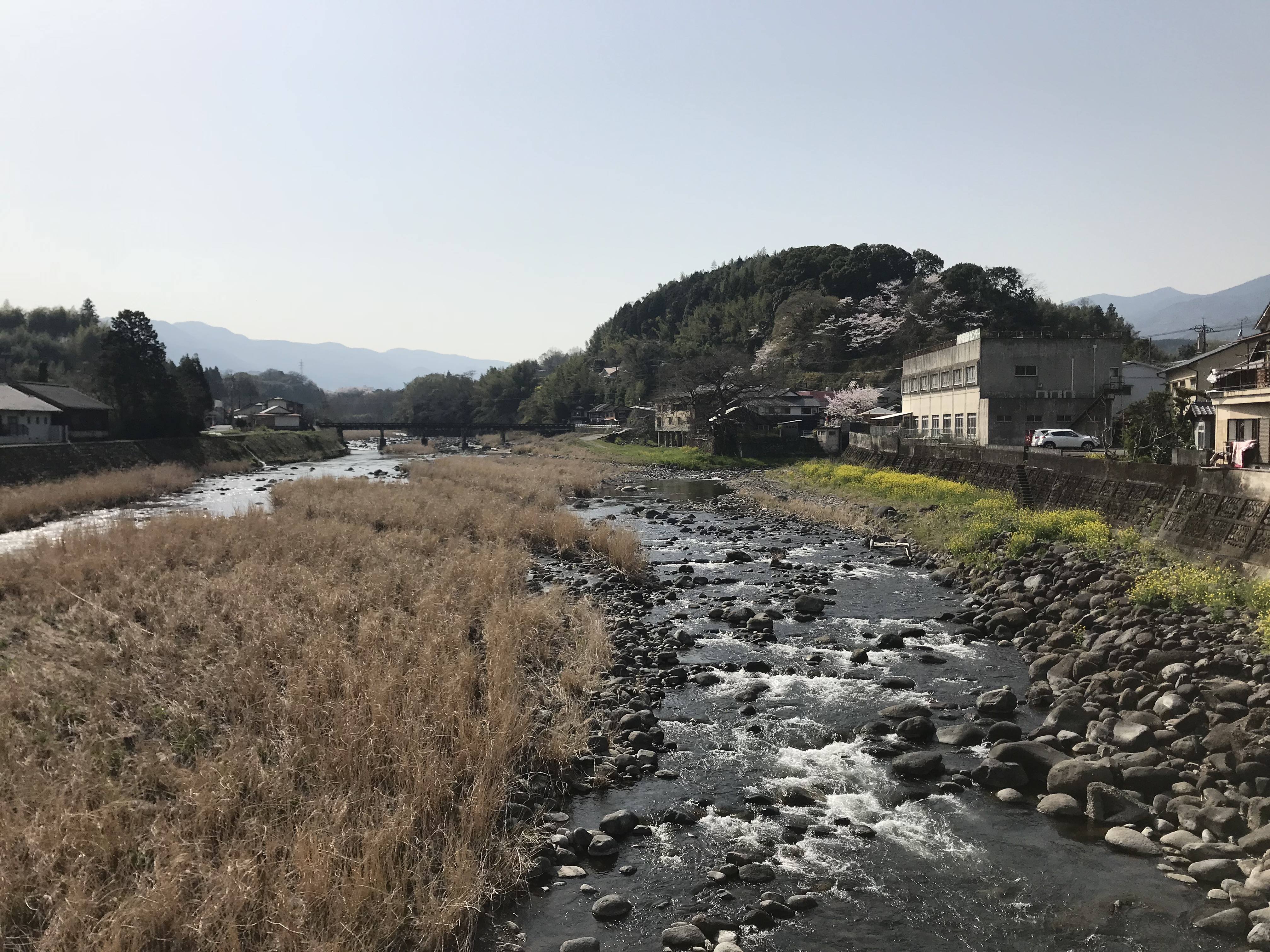 碩南大橋より望む大分川(上流側)